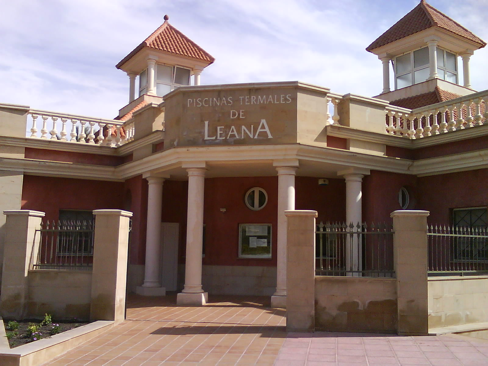 Leana Balneario in Fortuna, Spain.